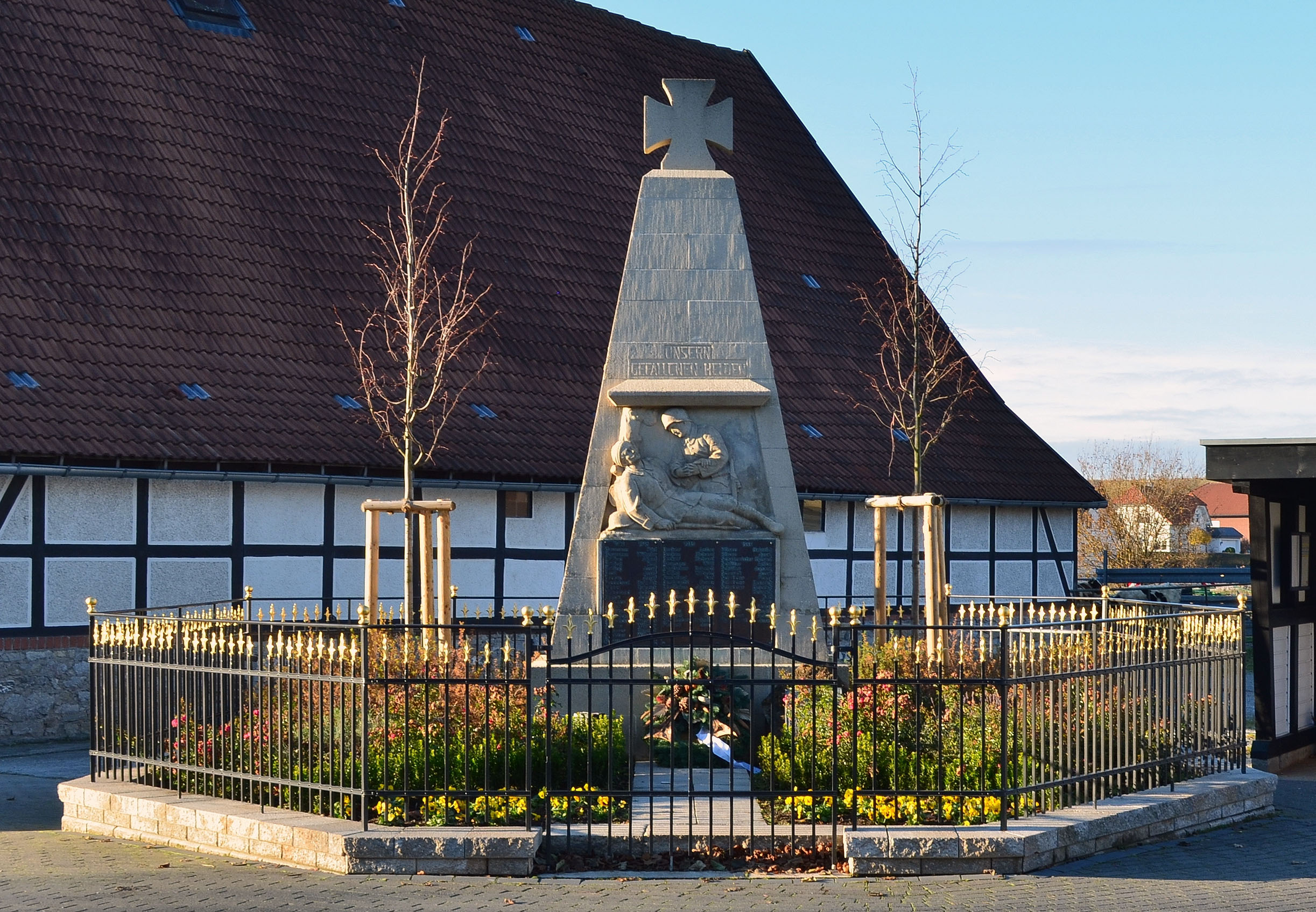 Brilon, Rösenbeck, Kiregerdenkmal im Ortszentrum